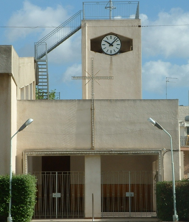 Solarino, Church of Madonna delle Lacrime